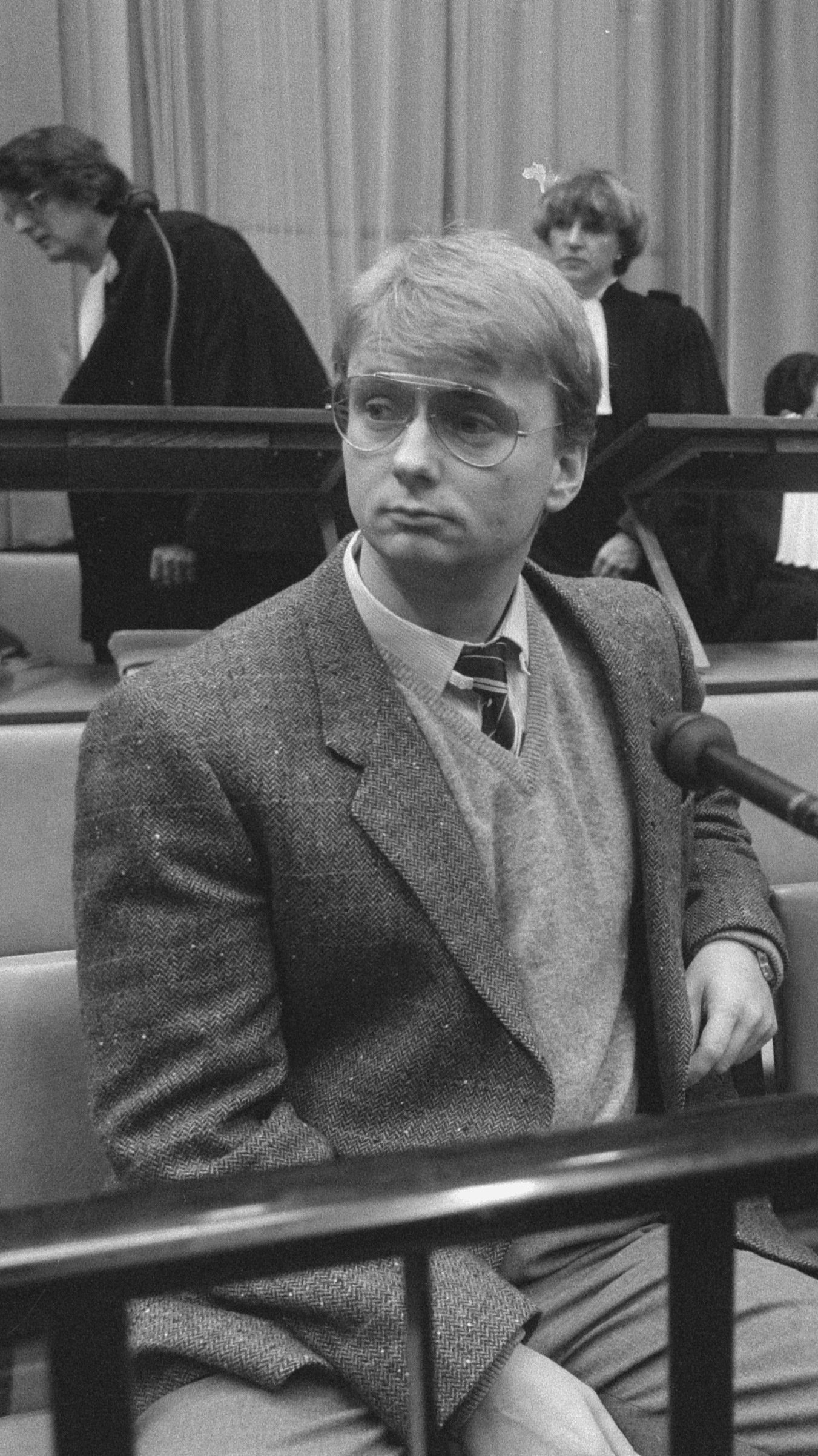 Proces tegen Heinekenontvoerders Cor van Hout en Willem Holleeder (r) in het Paleis van Justitie in Amsterdam. 22 januari 1987